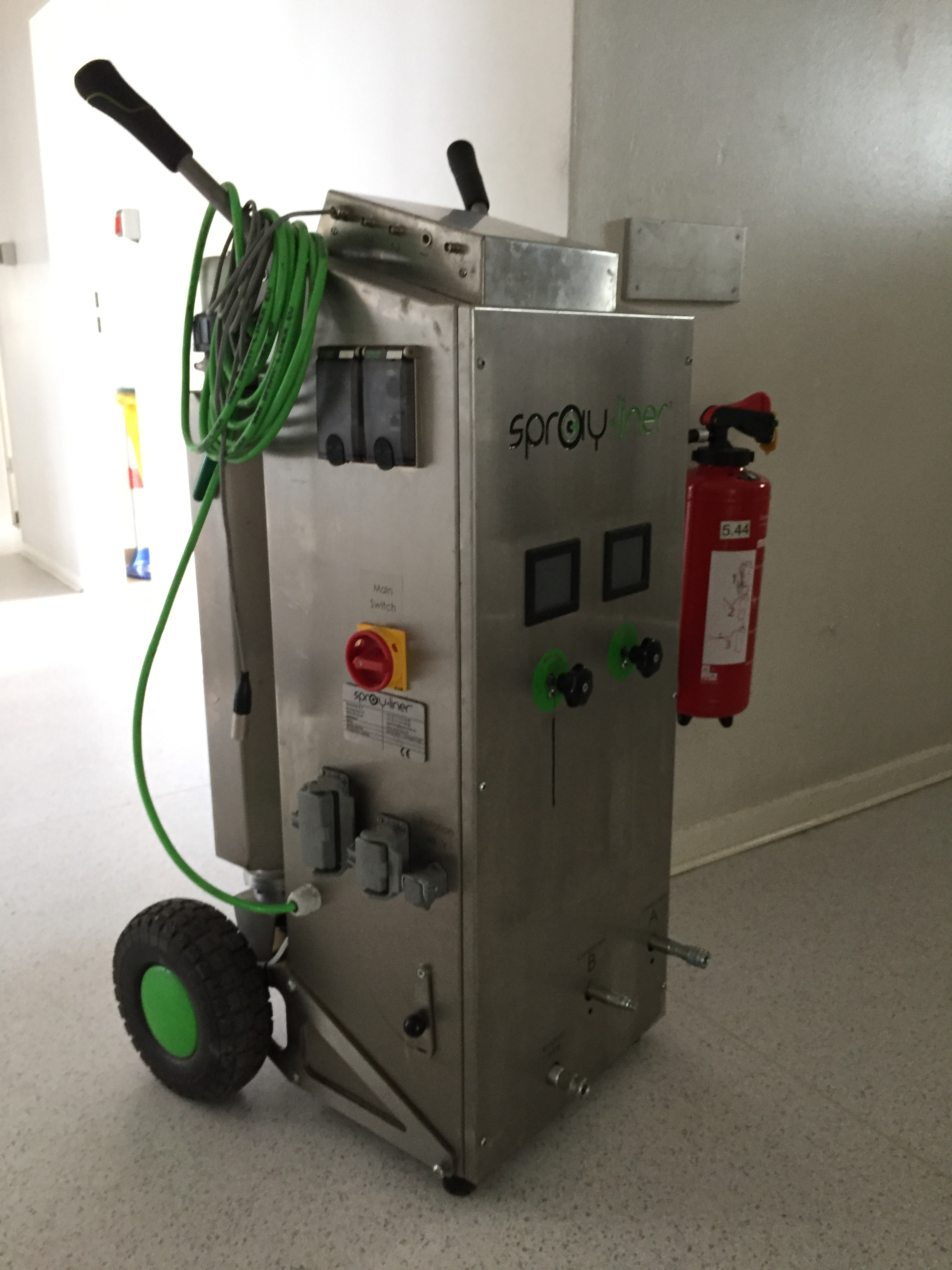 Rohrreinigung - Gerät